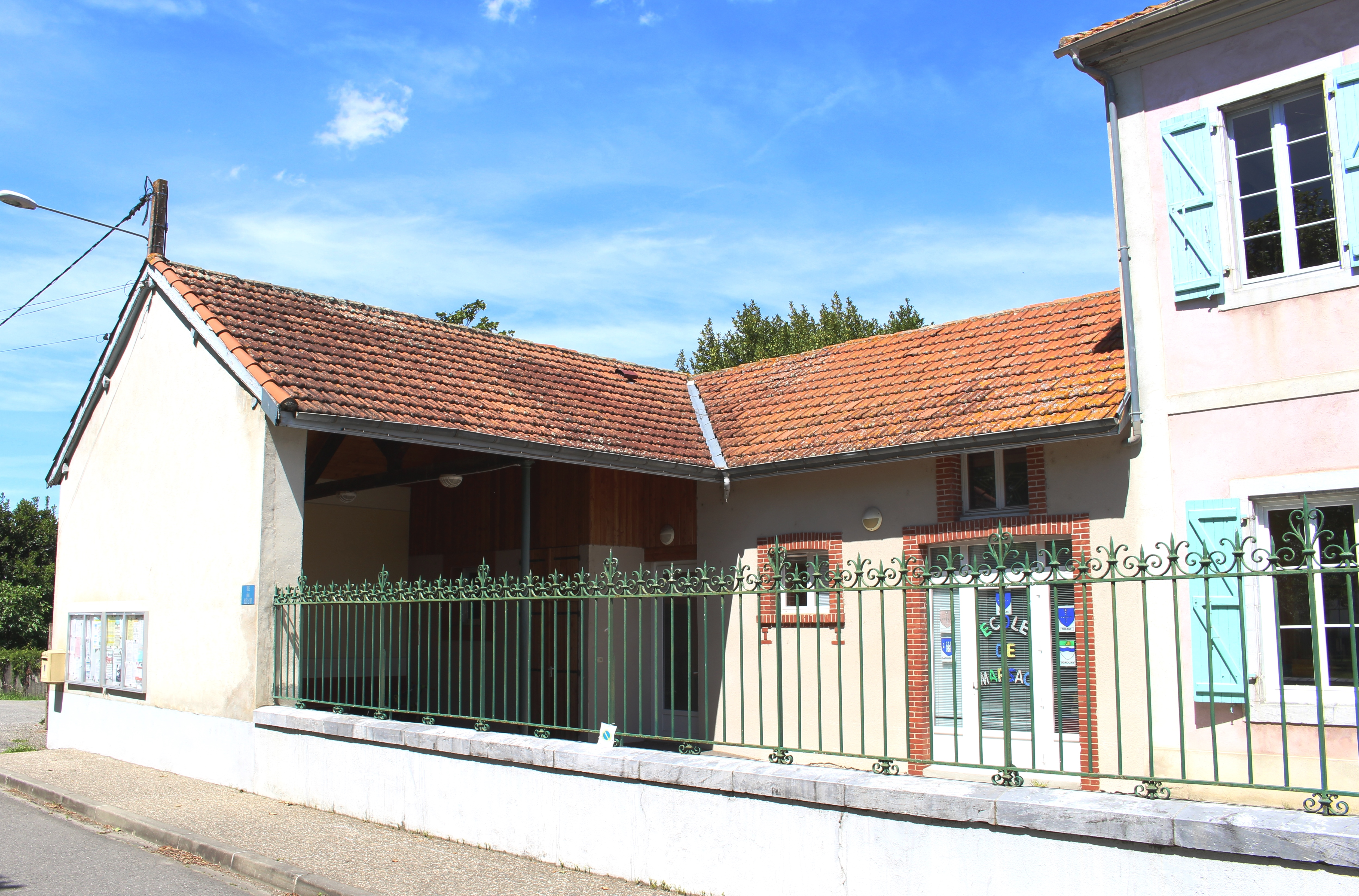 École de Marsac (Hautes-Pyrénées)